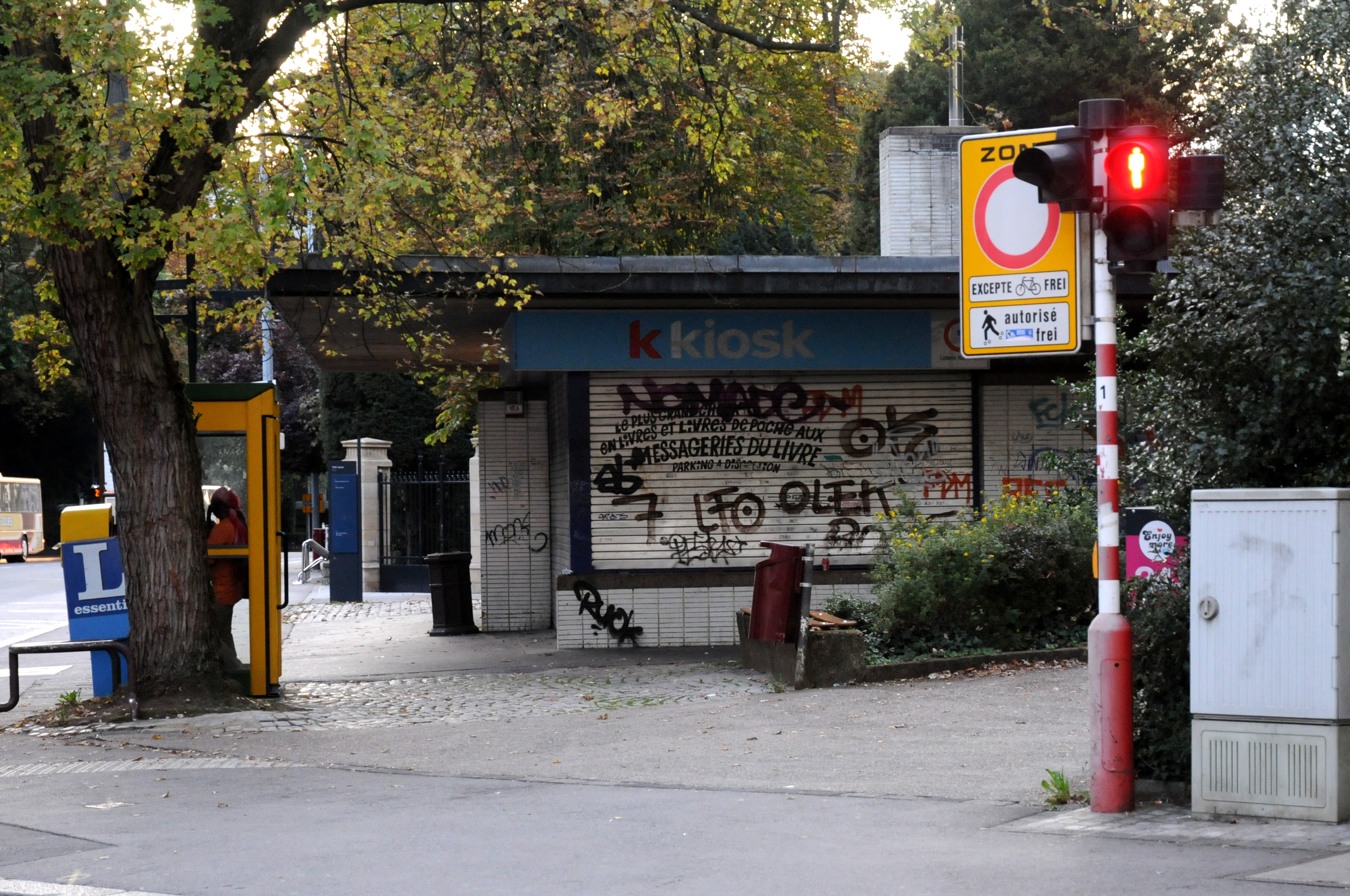 De fréieren Zeitungskisosk op der fréierer Charelis-Gare an der fréierer Arsenalstrooss.